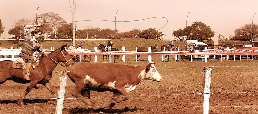 Gaúchos em atividade na Estância da Harmonia, Porto Alegre, Brasil.